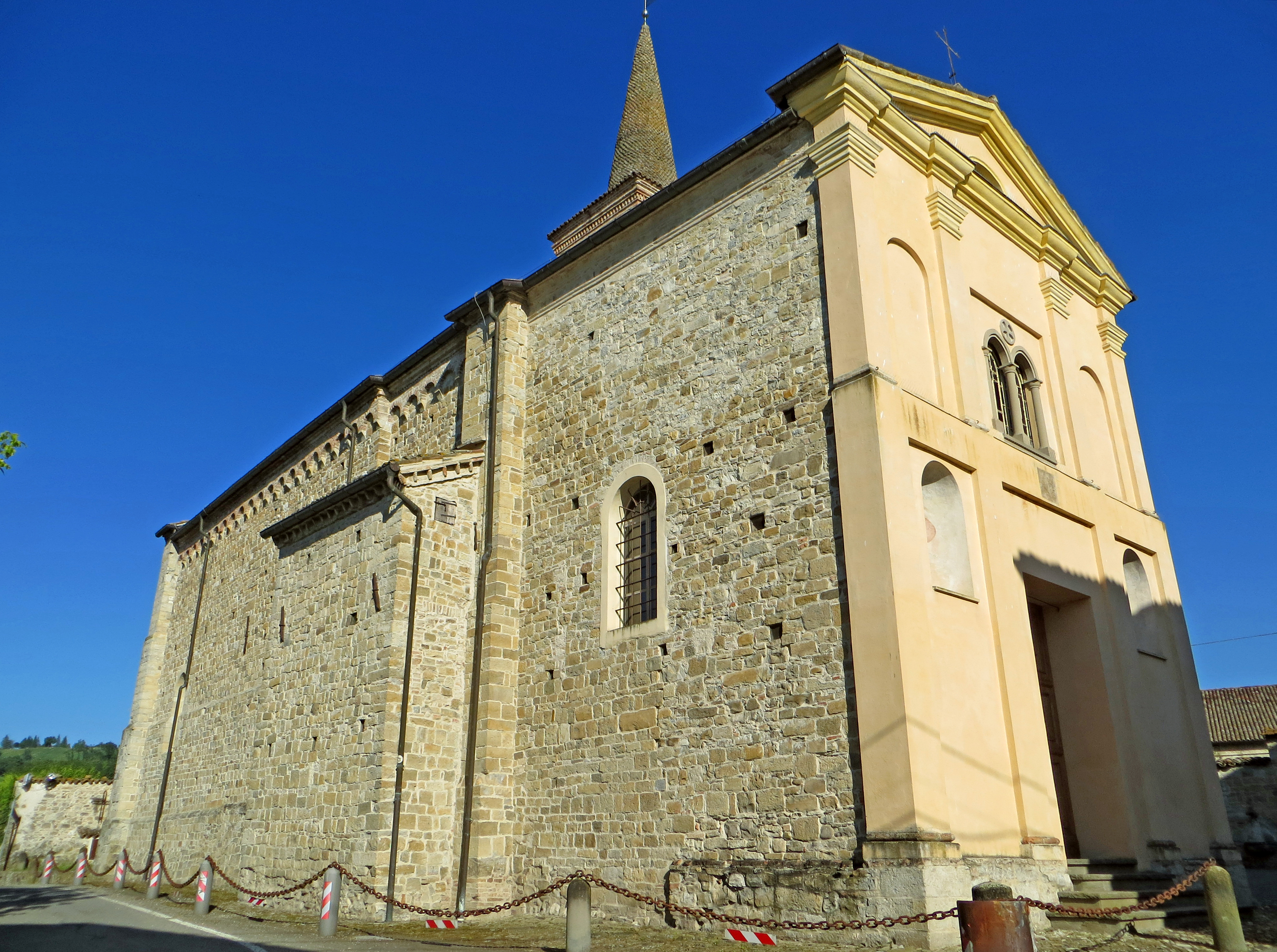 Chiesa di Sant'Ilario (Sant'Ilario Baganza, Felino) - facciata e lato nord